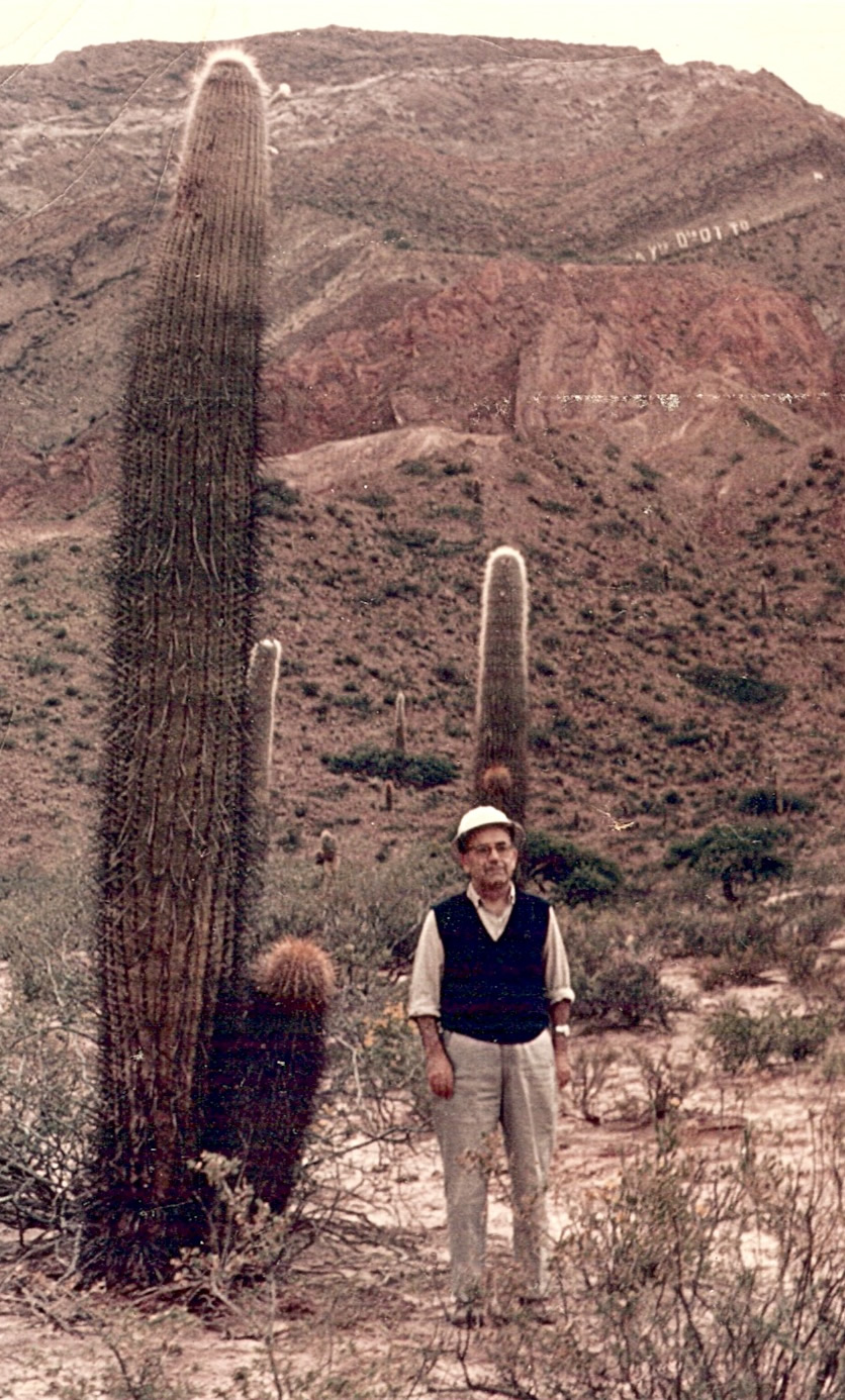 Victorio Angelelli en campaña en el noroeste argentino.